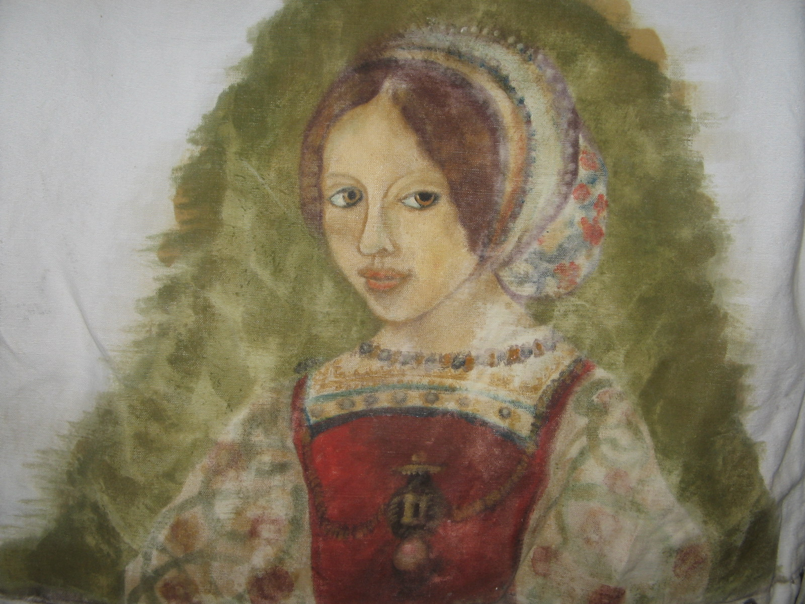 Rückenbild eines Oberndorfer Narro von 1969. Es zeigt eine Figur und nicht, wie heute üblich, ein Gebäude. Gemalt von Arno Klein. Das Kleid nimmt jedes Jahr am Narrensprung teil und zeigt dhaer leichte Abnutzungsspuren.